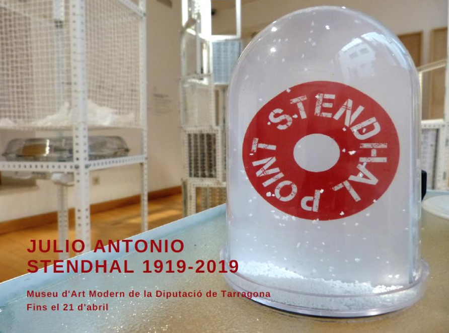 Aquesta obra formava part de l'exposició col·lectiva JulioAntonio/Stendhal